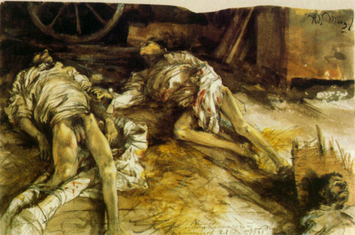 Adolph von Menzel: Drei gefallene Soldaten in einer Scheune. Bleistift, Aquarell; 18,6 × 27,5 cm. Bezeichnet oben rechts: Ad. Menzel. Unten Mitte von Menzels Hand: Leichenkammer Königinhof 21 Juli 1866. Berlin, Kupferstichkabinett (SZ Menzel N 1741)